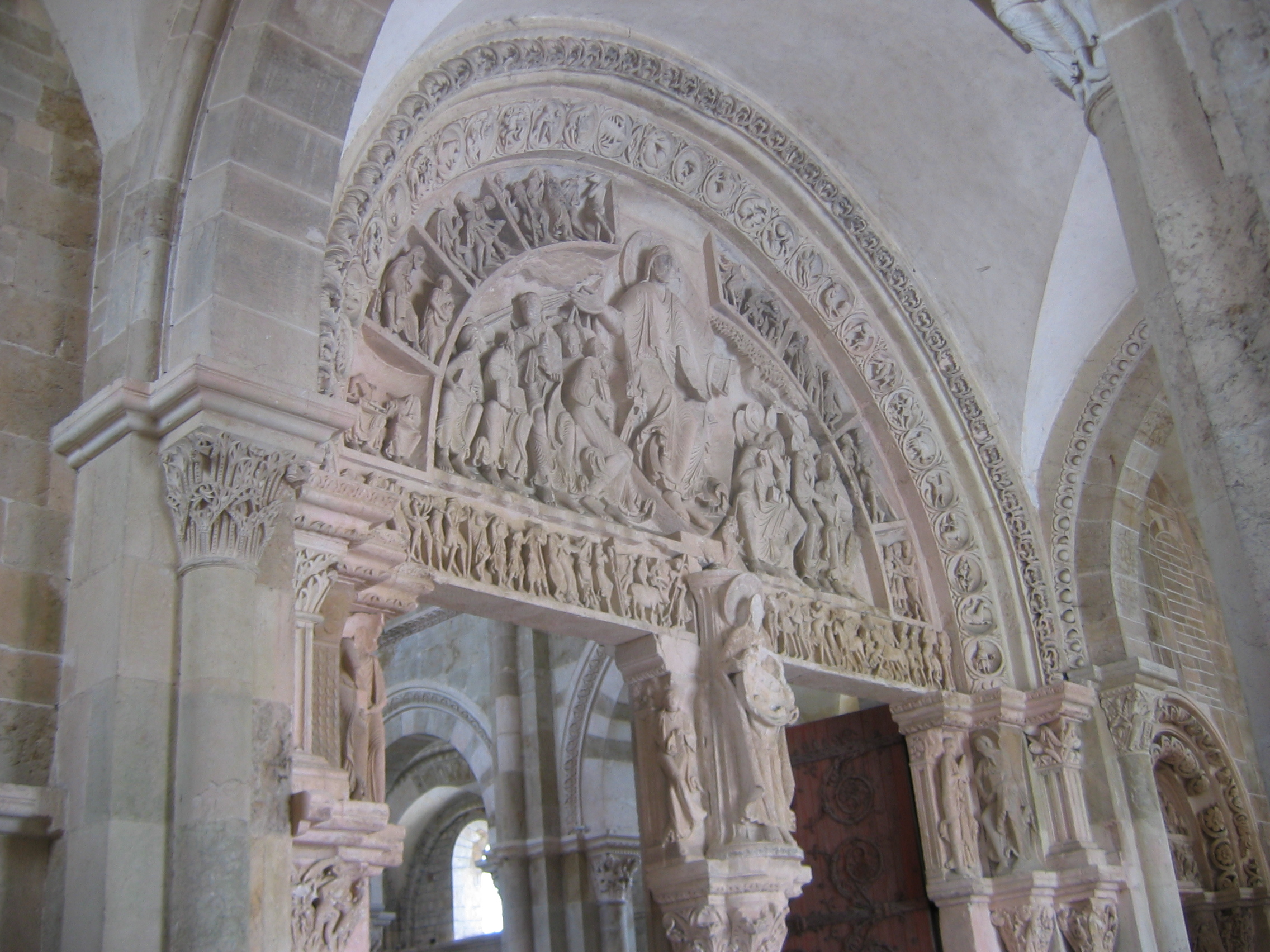 Abbatiale de Vézelay, Bourgogne, France : tympan central du narthex